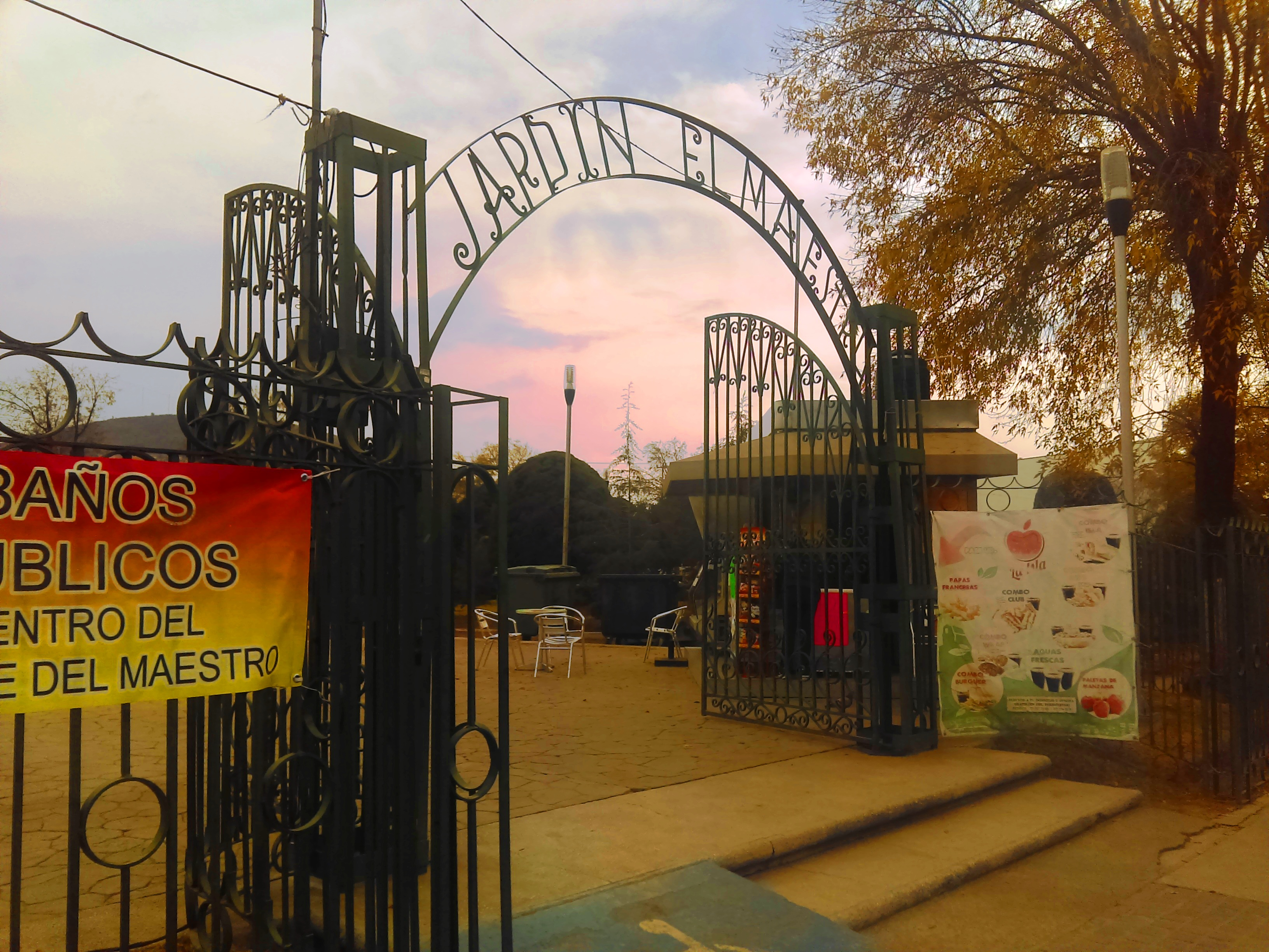 Jardín del Maestro en Pachuca.